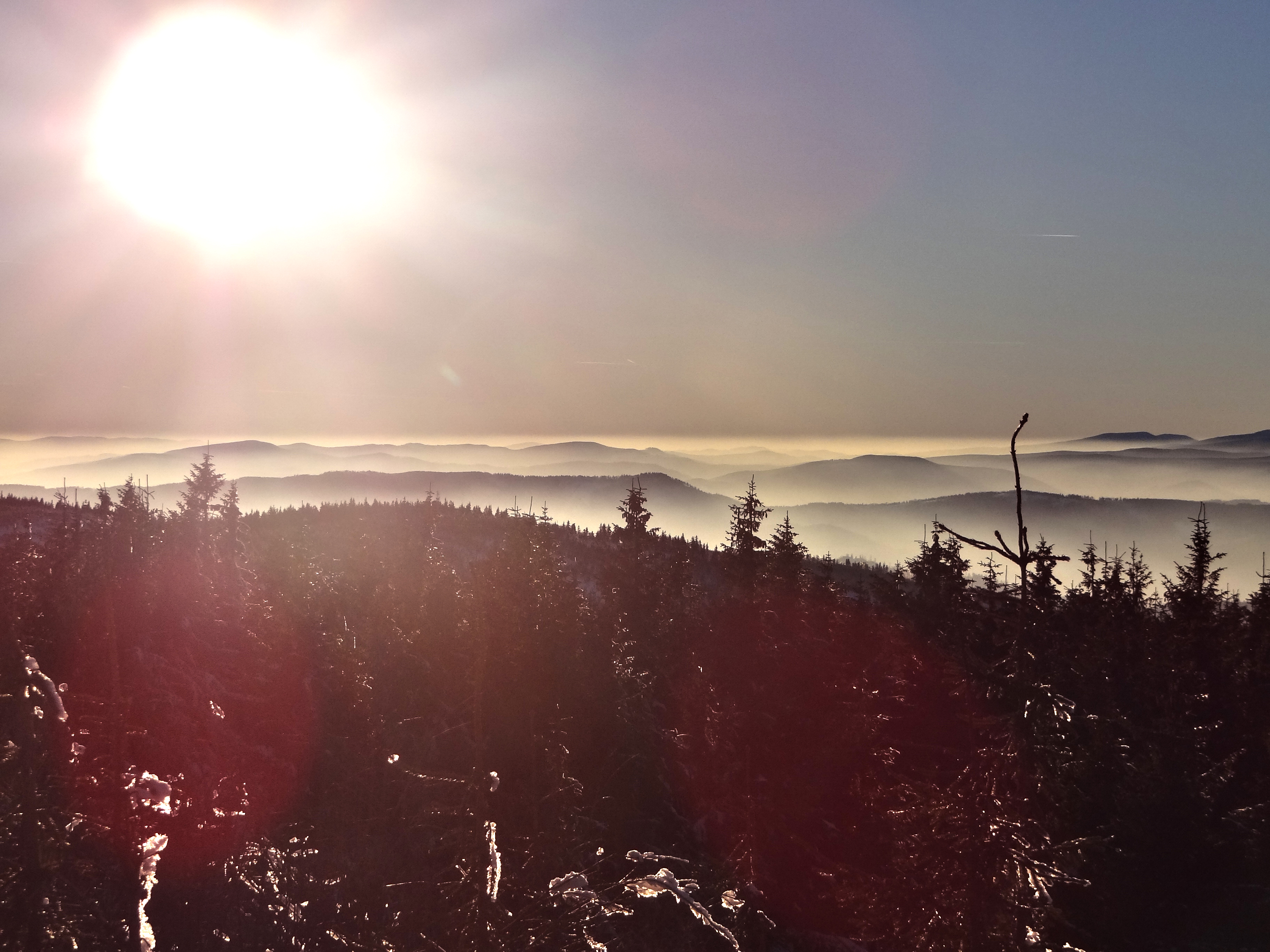 Fotografia zrobiona zimą, pokazująca widok ze szczytu Skrzycznego na stronę Beskidu.